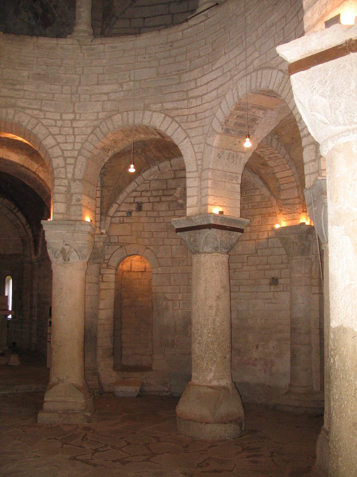 Autore Giorces. San Tomè, interno piano terra, ingresso scala per matroneo.